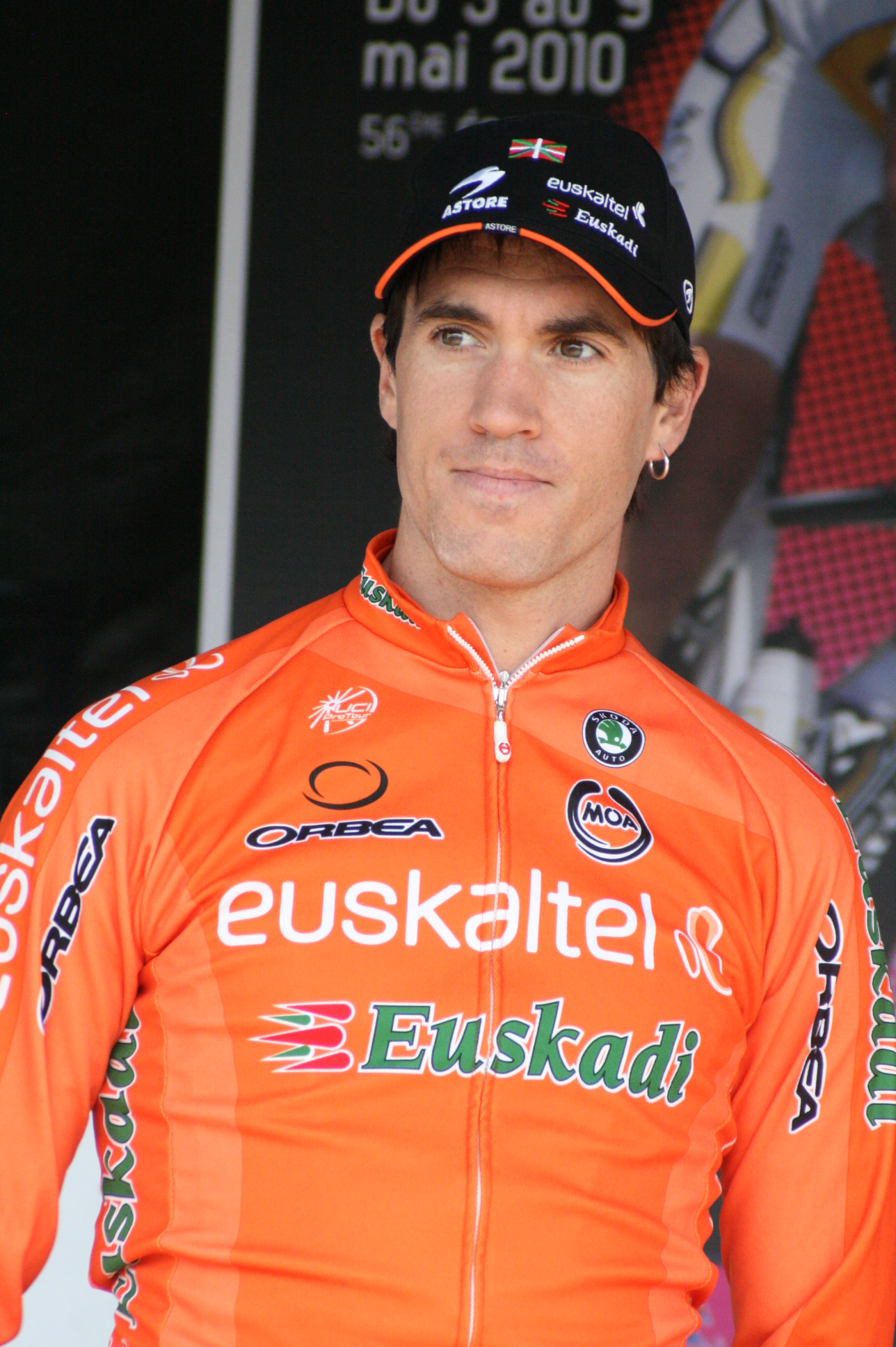 Koldo Fernandez lors de la présentation des équipes des 4 jours de Dunkerque